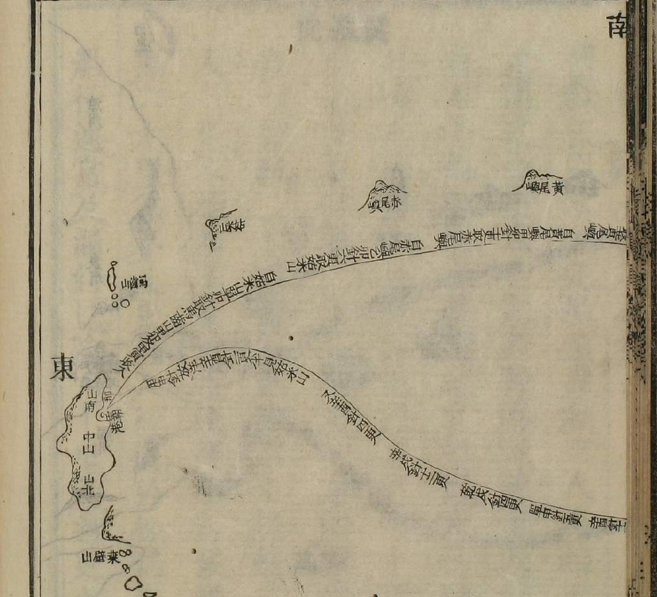 《中山传信录》卷一 《针路图》 显示福建往琉球路径。